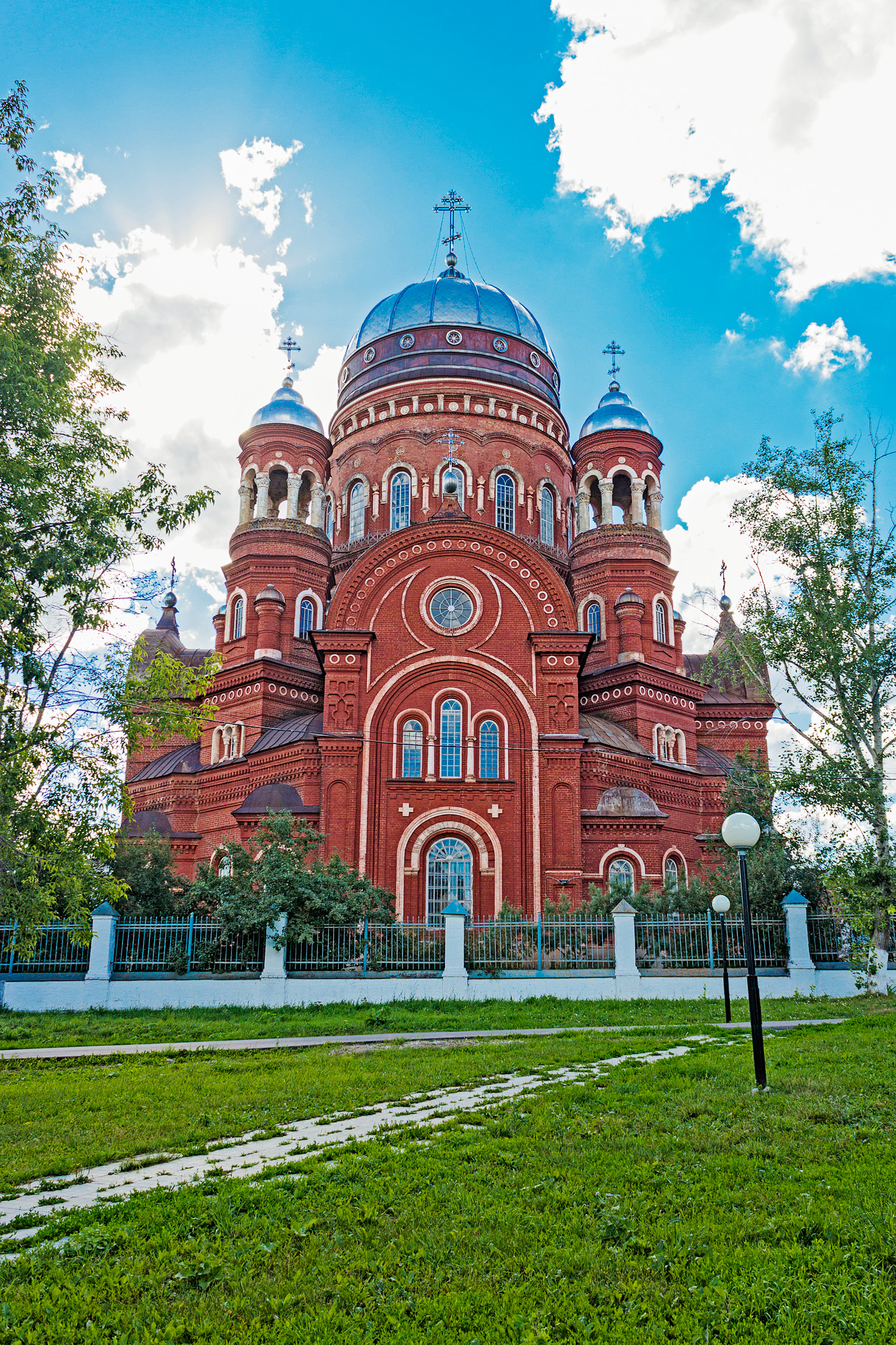 Троицкий собор с интерьером: улица Советская, 34, Уржум, Уржумский район, Кировская область